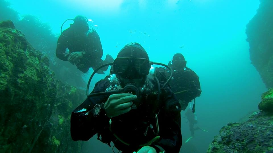 Si tienes certificación de buceo puedes conoces los hermosos puntos submarinos que tiene uno de los siete destinos imperdibles del patrimonio submarino en Chile